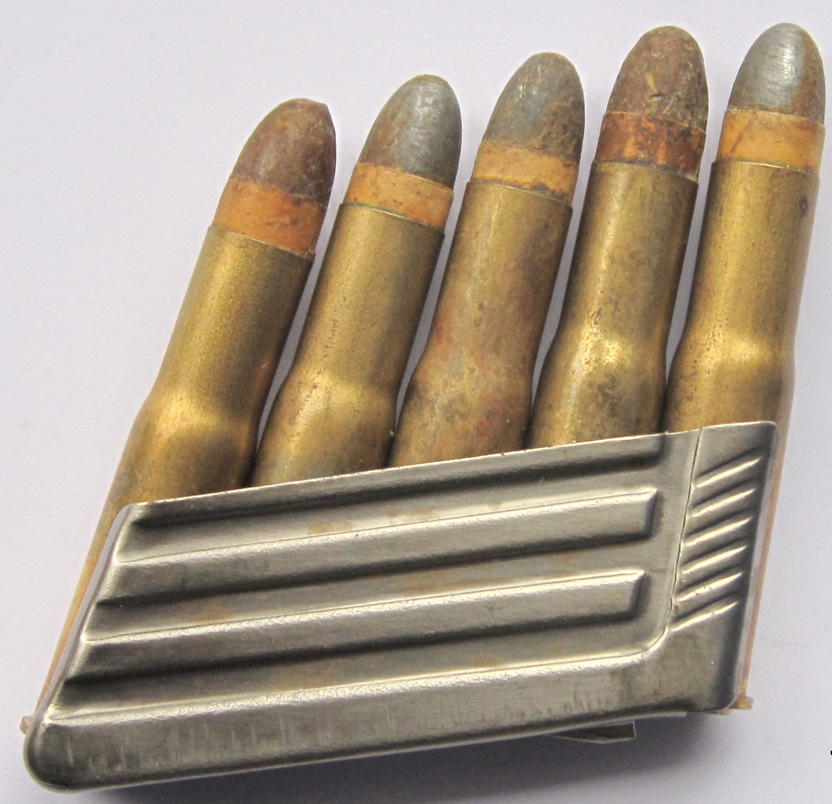 Okvirček z naboji 11x58 R za repetirko Mannlicher M1886.